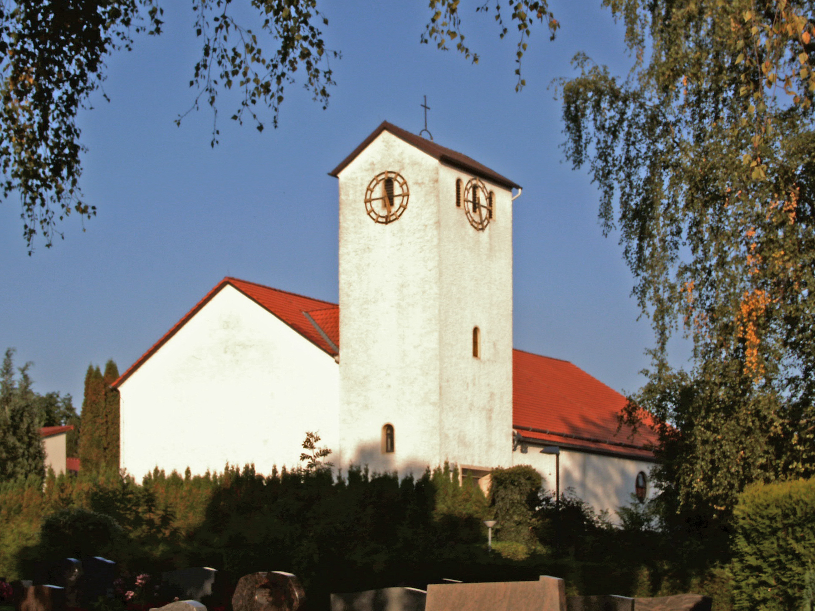 Katholische Kirche St. Konrad von Parzham in Uslar, Landkreis Northeim